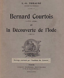 Photo de la couverture du livre ancien "Bernard Courtois et la découverte de l'iode" de L.G. Toraude